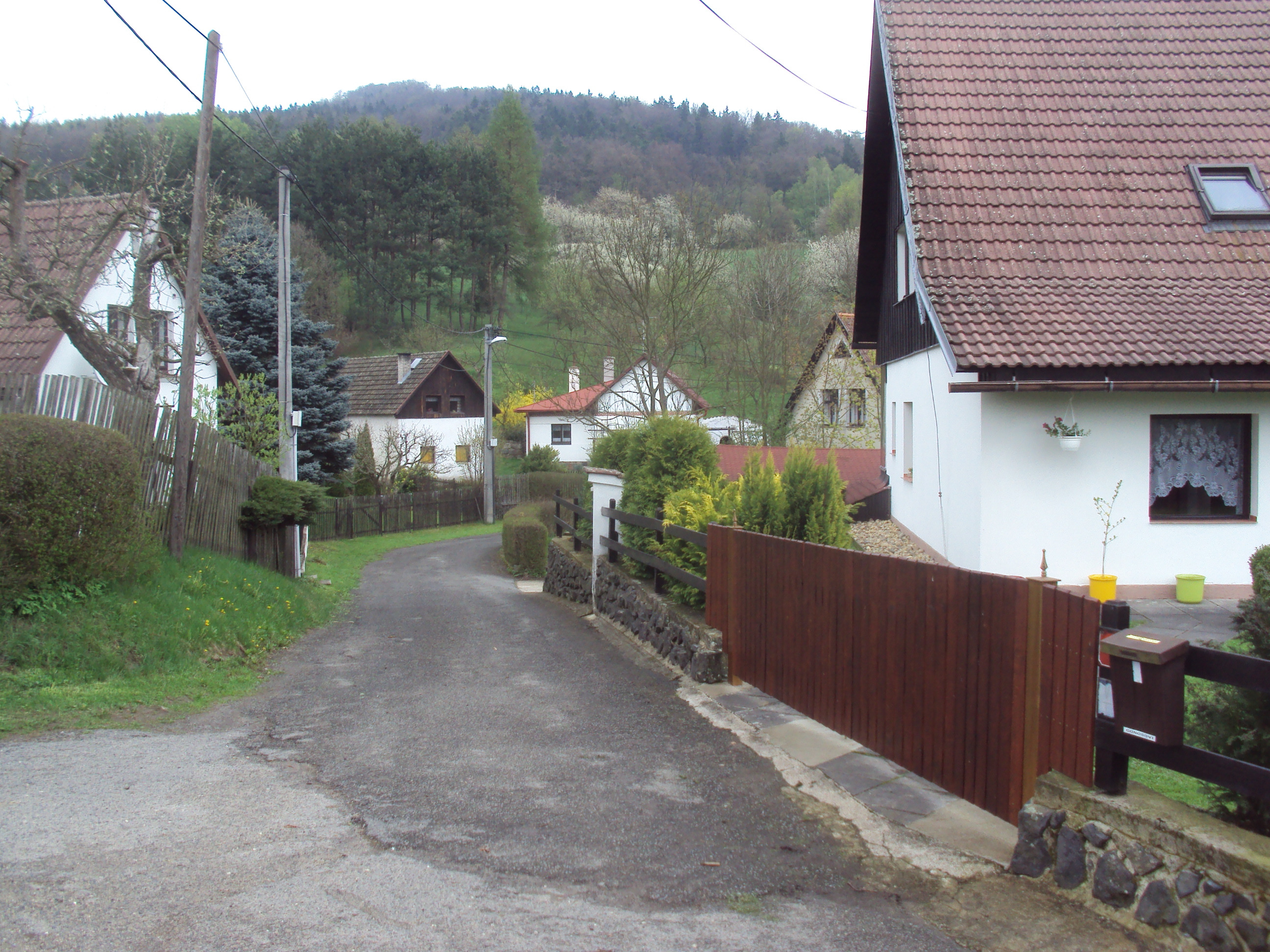 Vesnička Radeč na Českolipsku